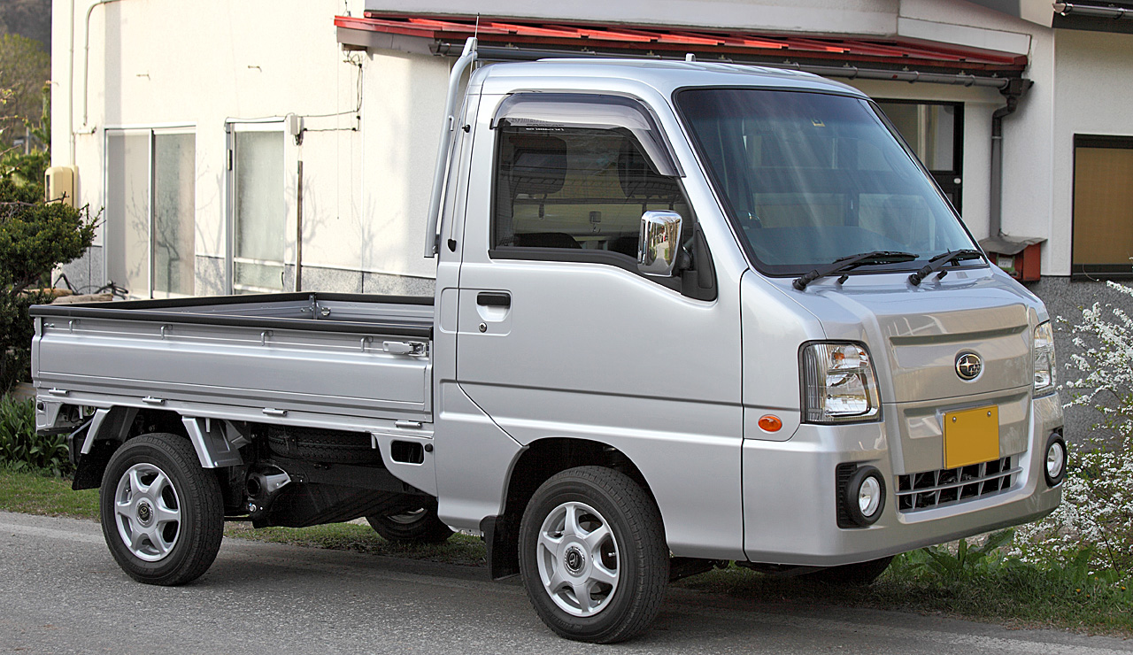 '09 Subaru Sambar